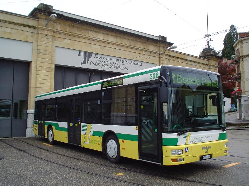 Autobus der Transports publics du Littoral Neuchâtelois im Oktober 2005 vor dem Depot in Neuchâtel (de.: Neuenburg).